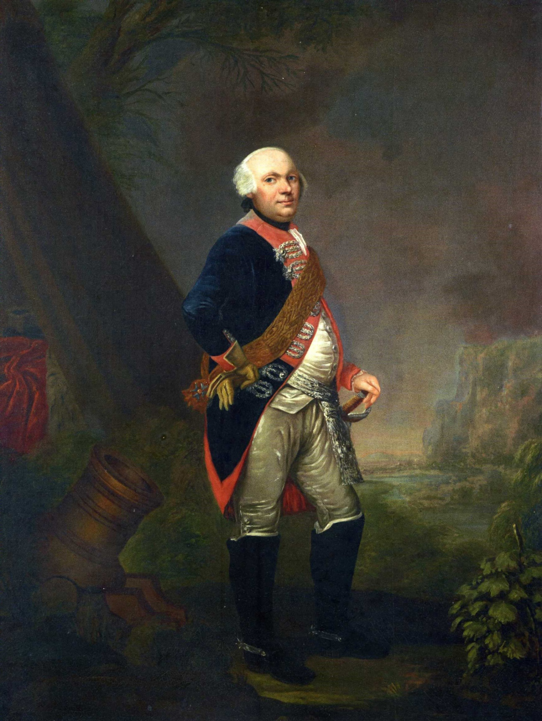 Kopie, Stiftung Preußische Schlösser und Gärten